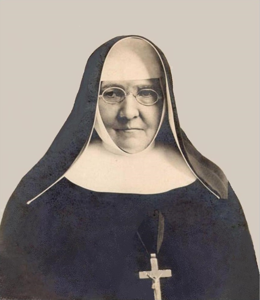 Siostra Małgorzata Łucja Szewczyk CMBB